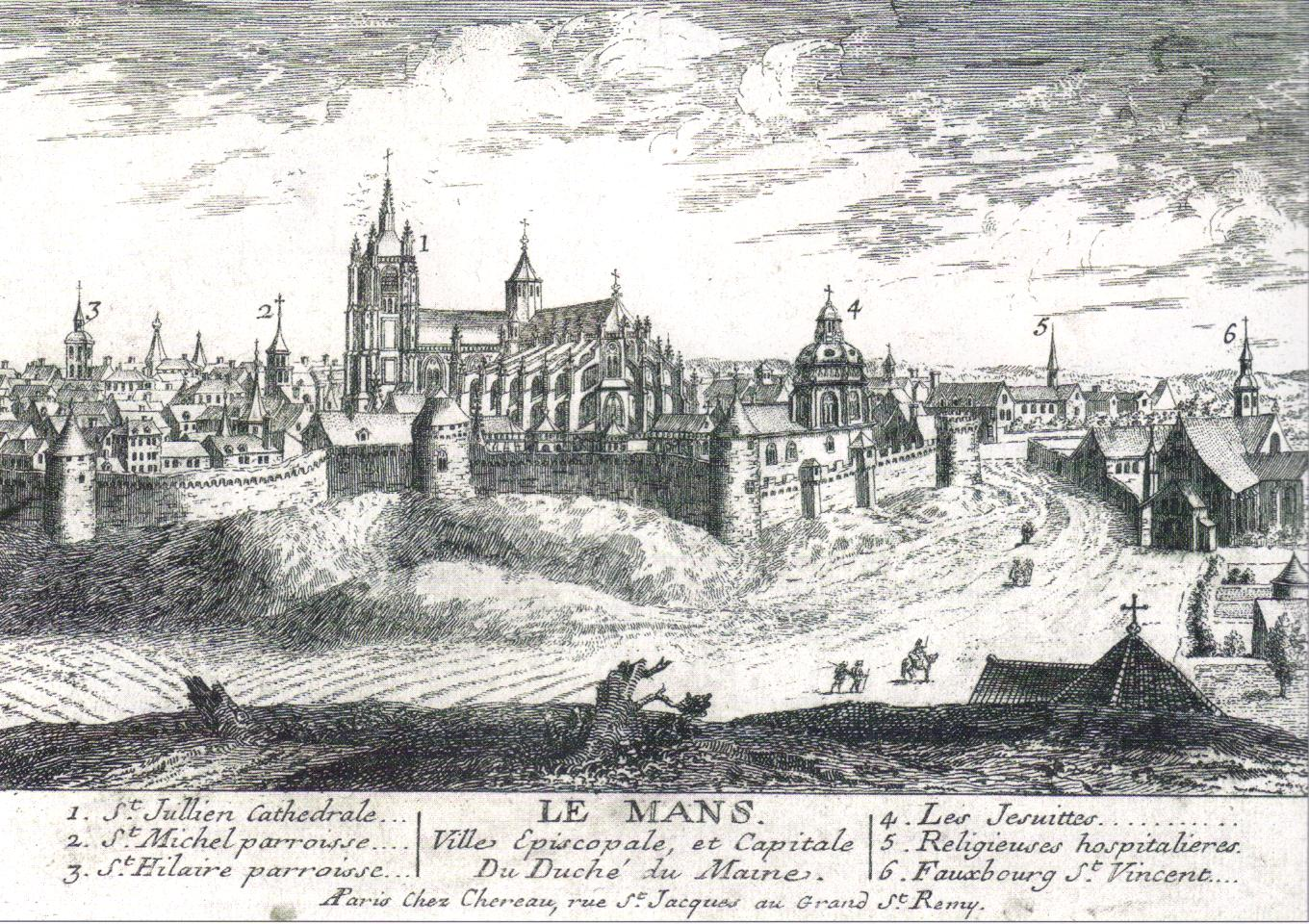 La ville du Mans au XVIIIème siècle